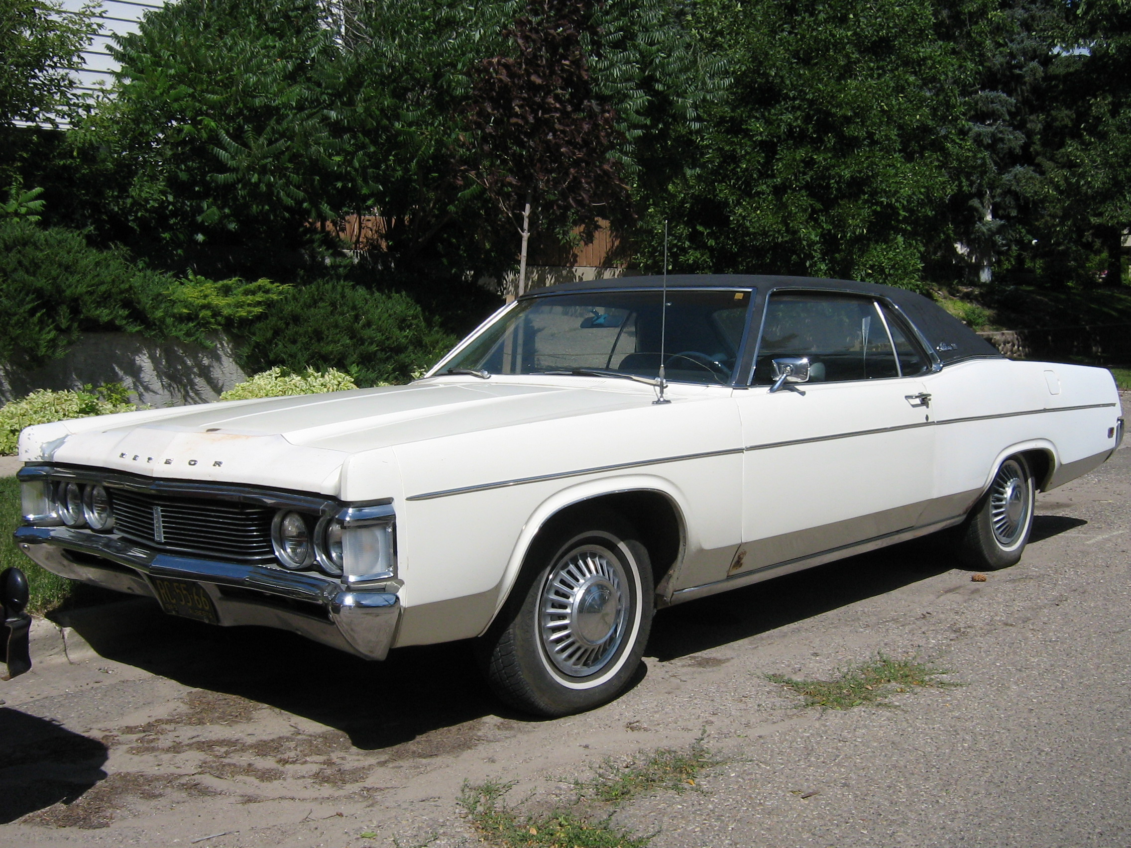 1969 Metero Rideau 500